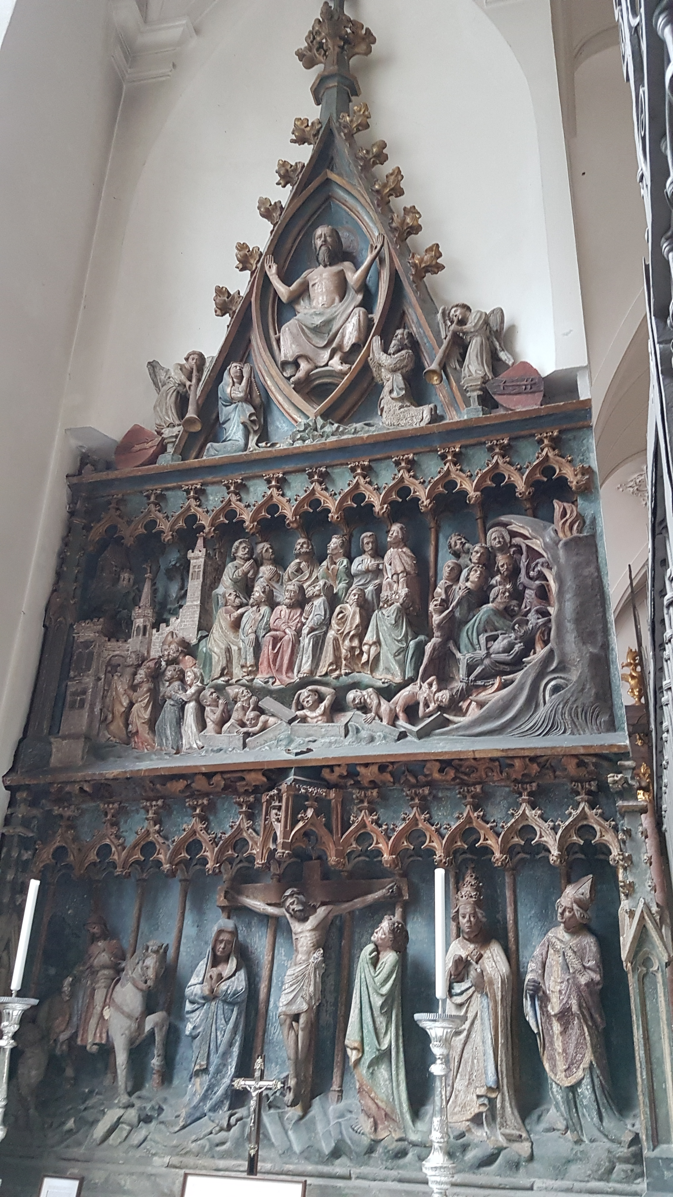 München-Altstadt, Peterskirche, Schrenkaltar - ältester erhaltener Altar in München, aus dem letzten Viertel des 14. Jahrhundert. Mit den Darstellungen: Kreuzigung Christi (unten), Zwölf Apostel (mitte) und Jüngstes Gericht (oben).